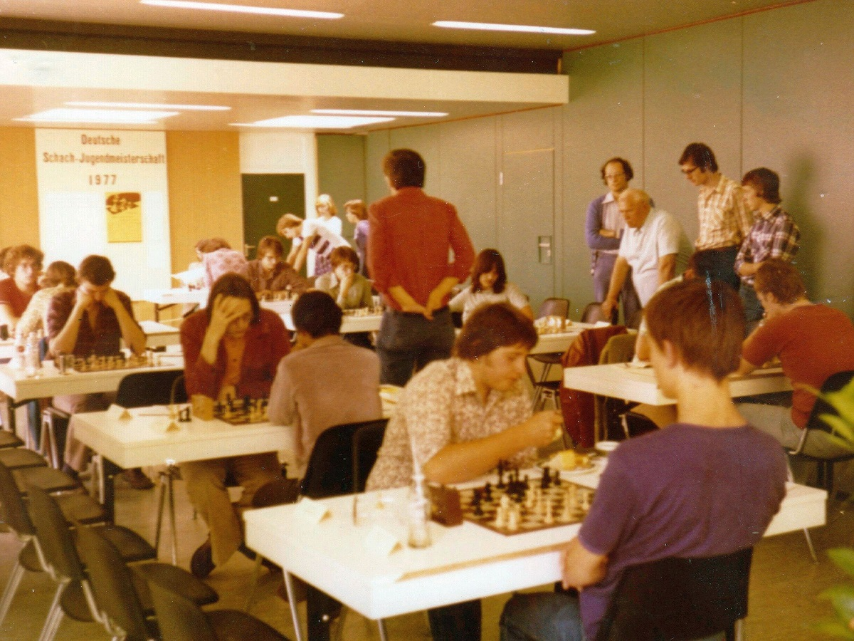 Deutsche Jugendeinzelmeisterschaft 1977 in Wallrabenstein. Linke Tischreihe mit Schwarz: Matthias Deutschmann, Dario Doncevic, Peter Weber, ?. Rechte Tischreihe: ?, Ralf Lau, Stefan Kindermann, Dirk Paulsen, ?. Stehend an Wand: ?, ?, Herbert Vetter, ?.